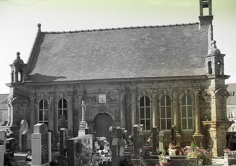 église Lanhouarneau, denez goasguen.